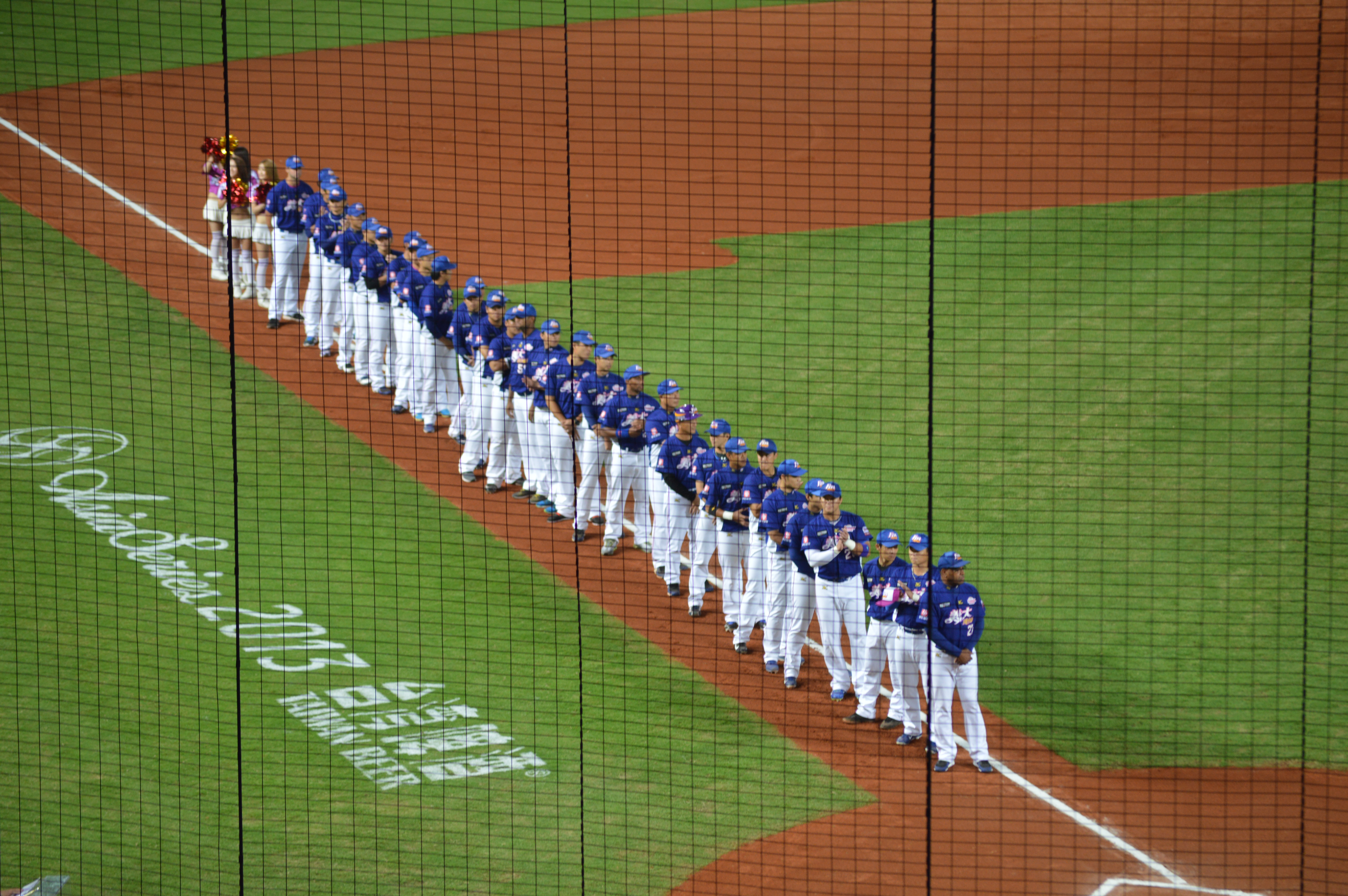 2013亞洲職棒大賽第2場，義大犀牛出場